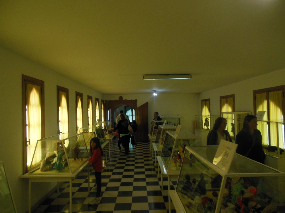 República de los Niños